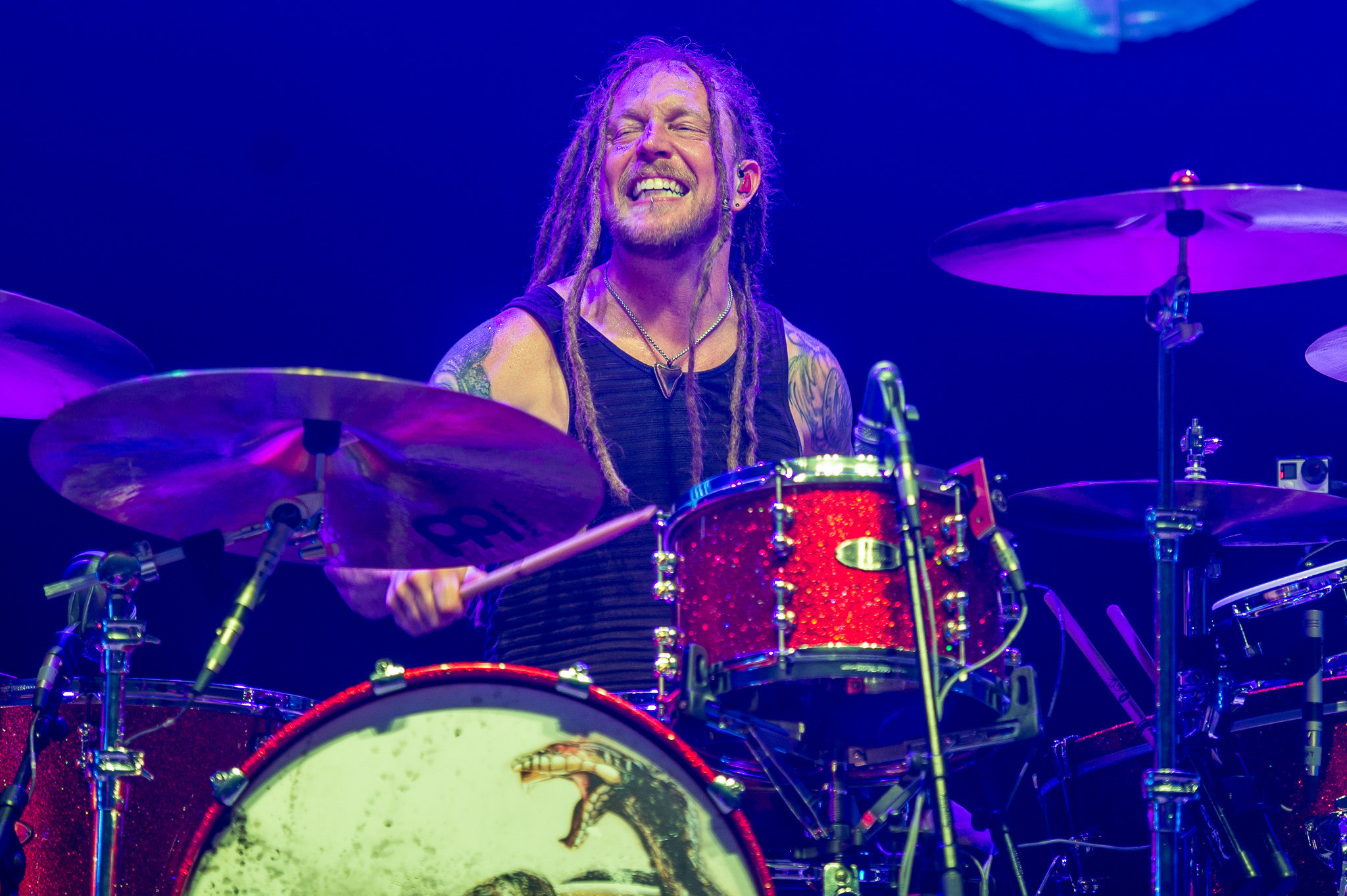 ARGO-Konzerte,Alternarena,Barry Kerch,Festival,Konzert,Livekonzert,Livemusik,Musik,RiP,Rock im Park 2016,Shinedown